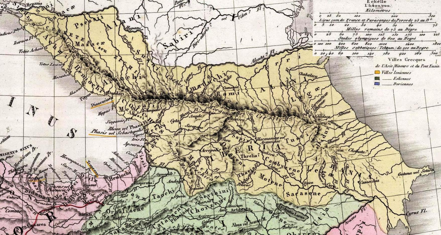 Carte Generale l'Asie Mineure de l'Armenie de la Syrie, de la Mesopotamie du Caucase & A. Atlas Universel en 67 feuilles No. 8. Dresse par A. Brue, Geographe. Reoue par E. Levasseur, Membre de l'Institut, Institut Geographique de Paris. Ch. Delagrave. Editeurs de la Societe de Geographie. 58 Rue des Ecoles. (inset) Colonies des Pheniciens. (inset) Marche de Cyrus le Jeune. (inset) Etat de l'Asie.